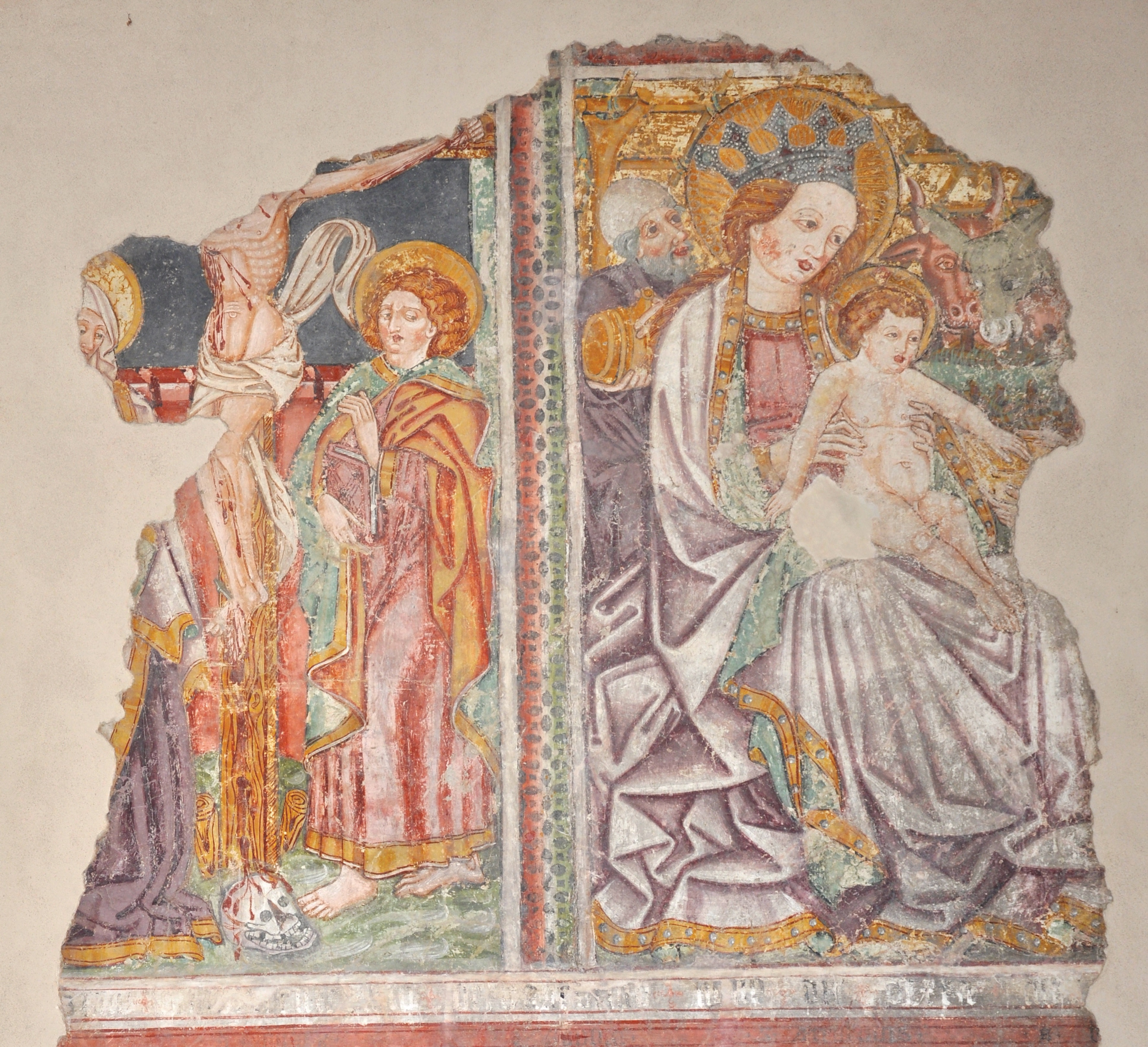 Detajl freske, cerkev sv. Helene v Podpeči.